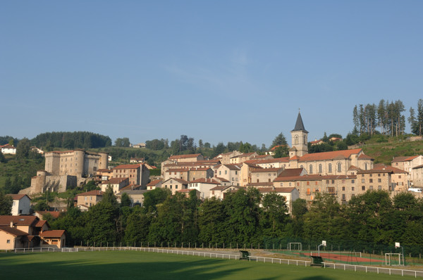 Description: Le vilage de Chalmazel, photo réalisée le 16 juillet 2006 au matin Source: Carotoc